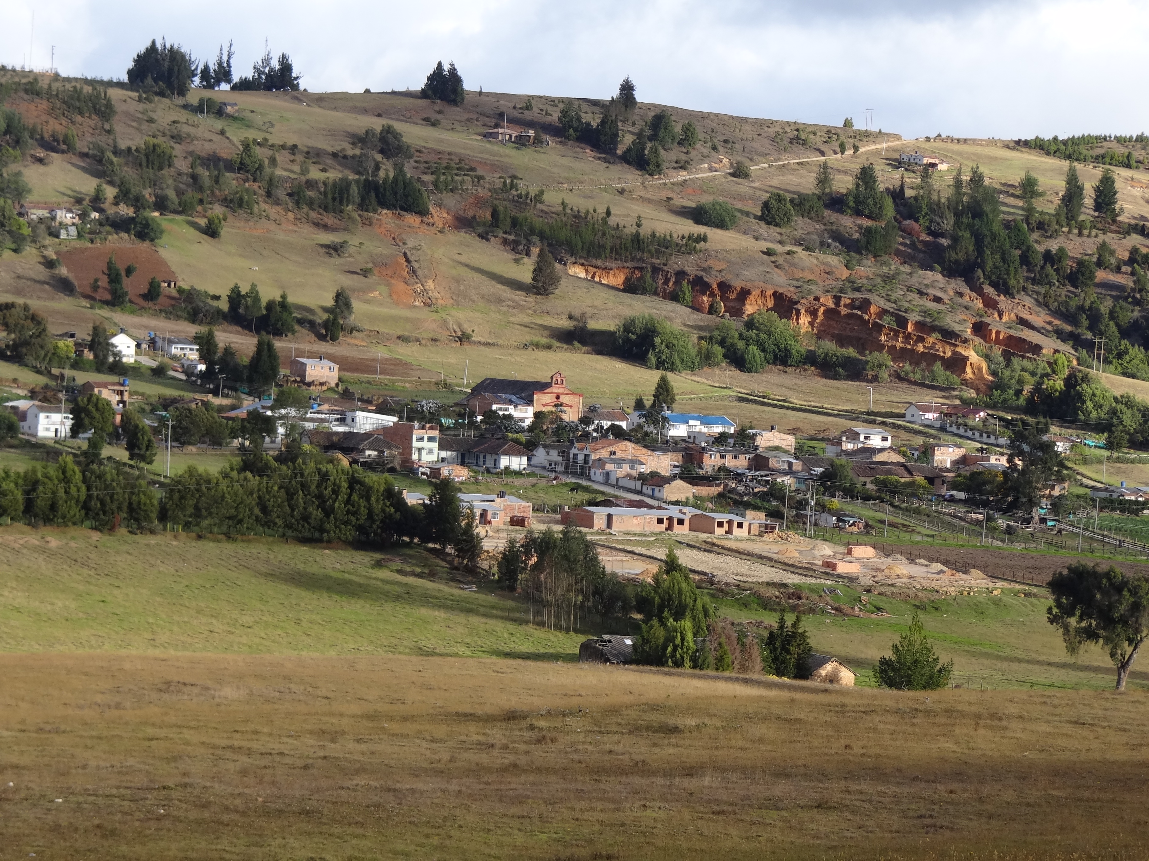 Panorámica del área urbana del municipio de Chivatá, departamento de Boyacá, Colombia